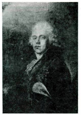 А. А. Яковлев, отец Натальи Александровны Захарьиной-Герцен, жены писателя